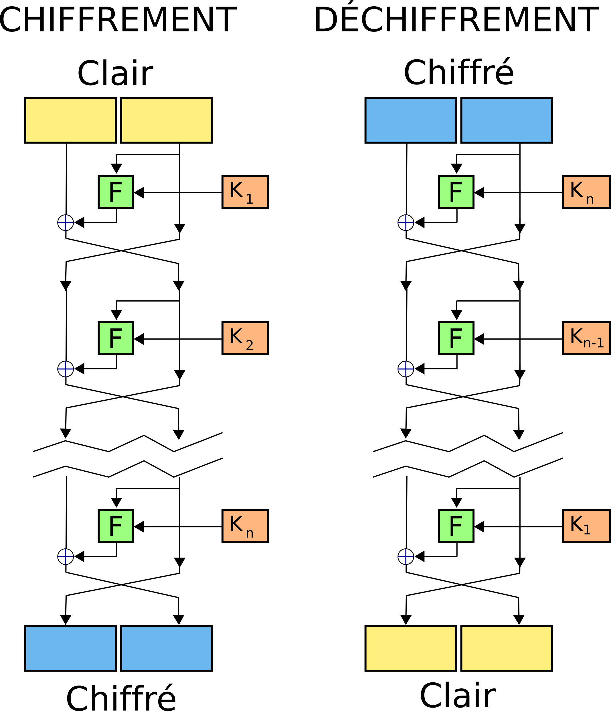 Feistel Cipher